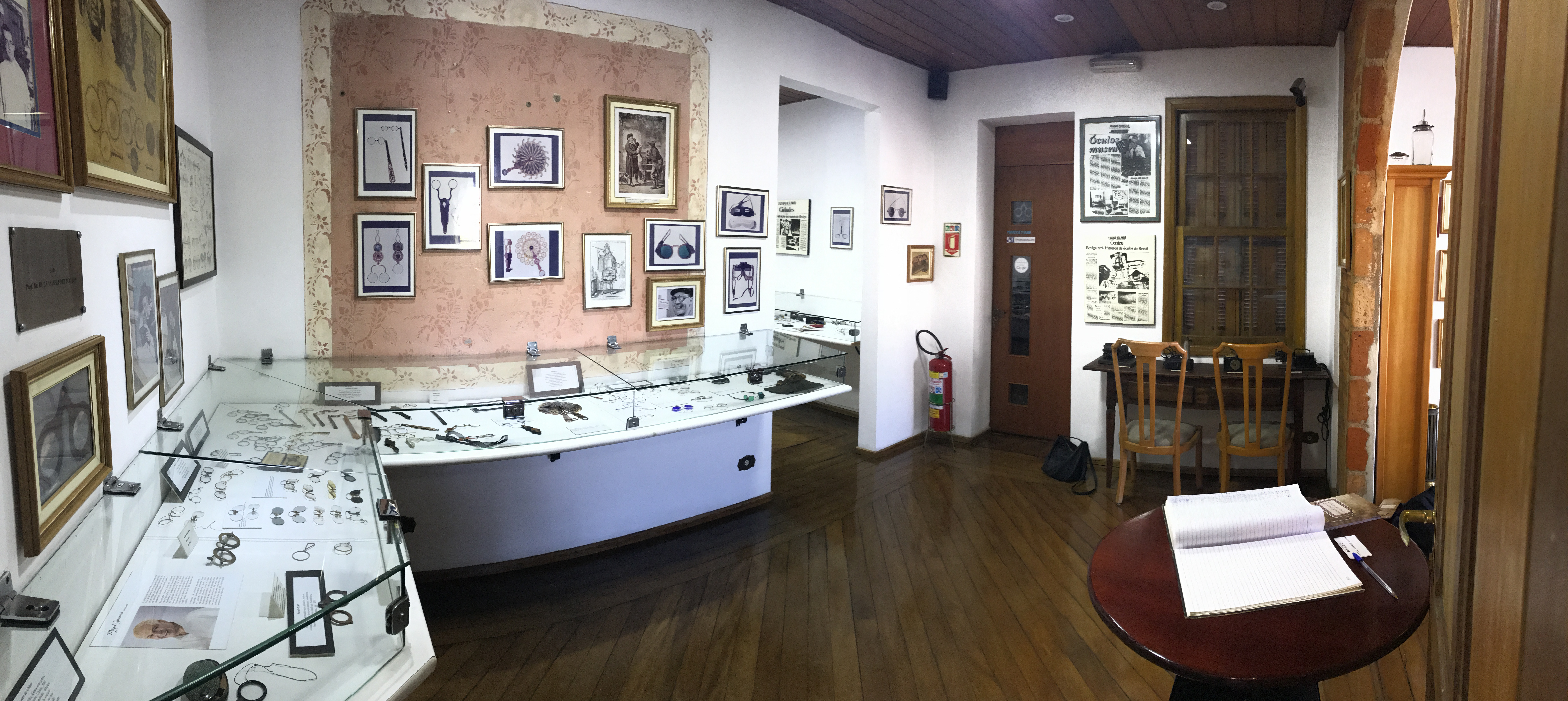 Panorama da Sala Prof. Dr. Rubens Belfort Mattos.